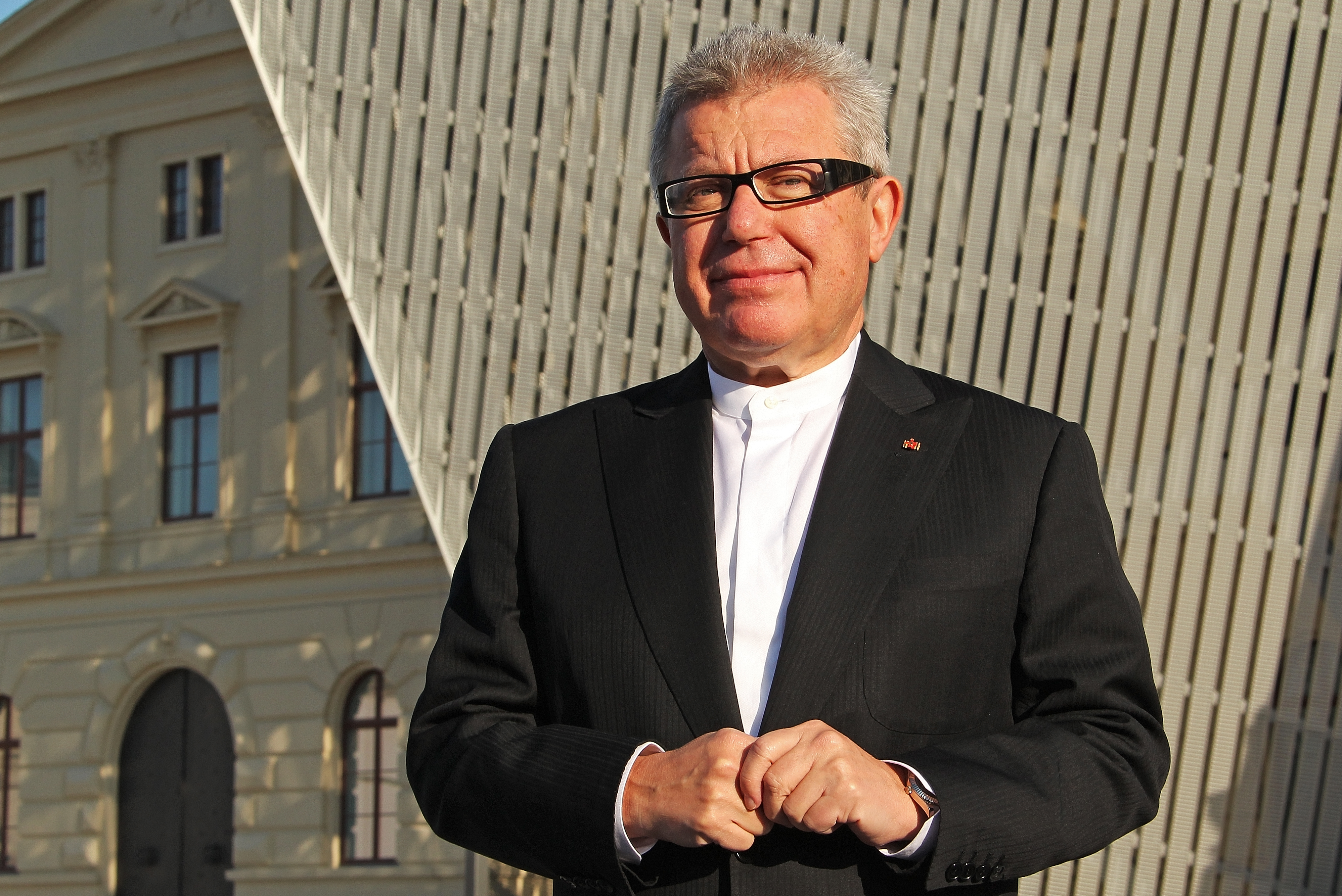 Vor dem Neubau des Museums der Architekt des Museumsneubaus Daniel Libeskind.Nach einer siebenjährigen Umbauzeit wird das Militärhistorische Museum der Bundeswehr in Dresden am 14. Oktober 2011 neu eröffnet. Hierzu findet ein Festakt statt, in dessen Rahmen neben dem Bundesminister der Verteidigung,Dr.Thomas de Maizière, der Ministerpräsident des Freistaates Sachsen,Stanislaw Tillich, der Architekt des Museumsneubaus Daniel Libeskind und der Direktor des Museums, Oberst PD Dr. Matthias Rogg,Worte an die Gäste richten.©Bundeswehr/Mandt